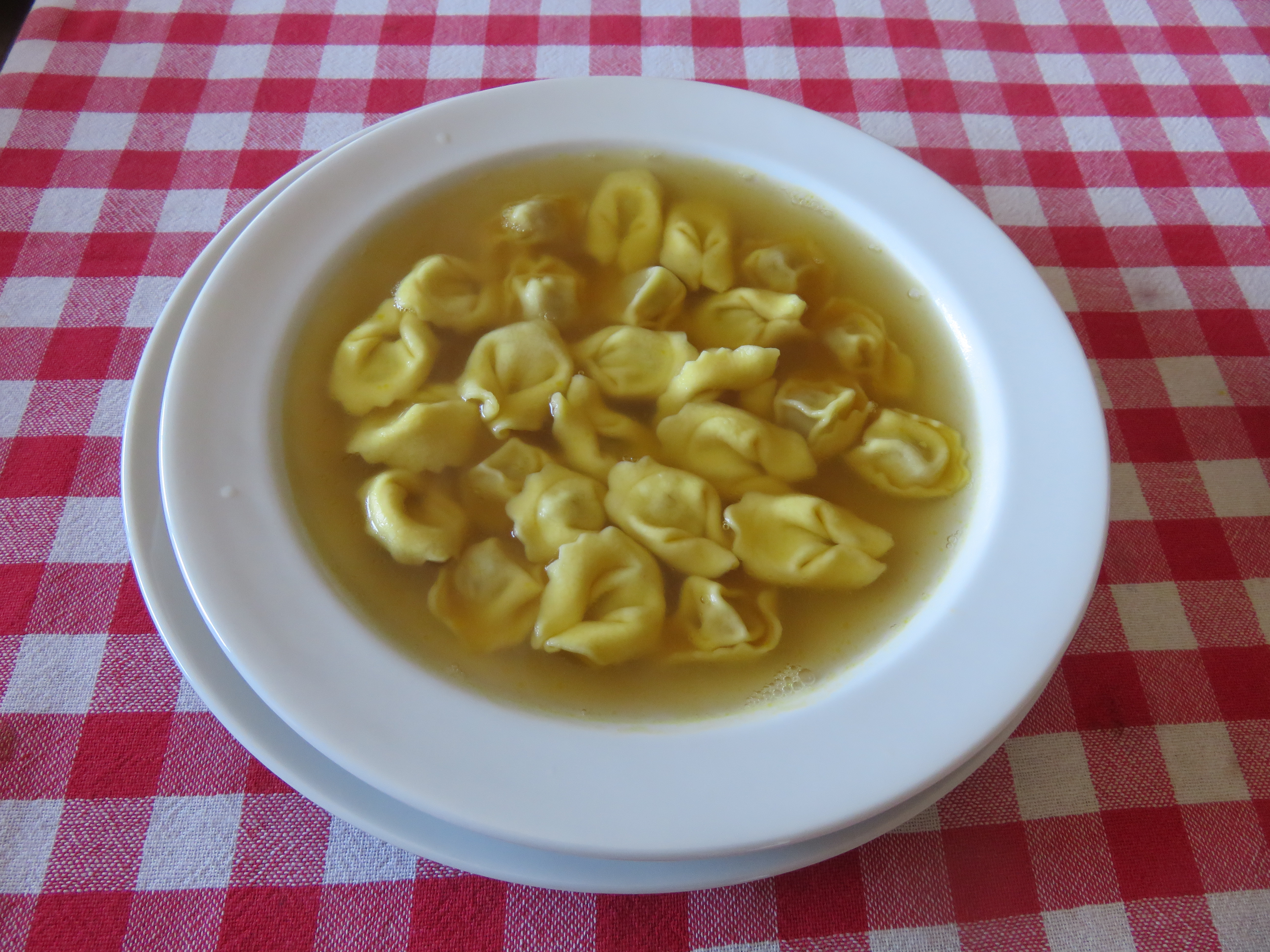 Cappelletti ferraresi in brodo di manzo